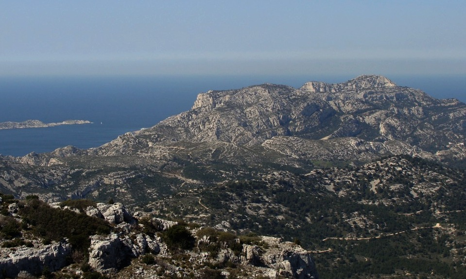 Le massif de Marseilleveyre vu du Mont Puget (vue prise en direction du sud-ouest); à gauche on aperçoit l'île de Jarre.